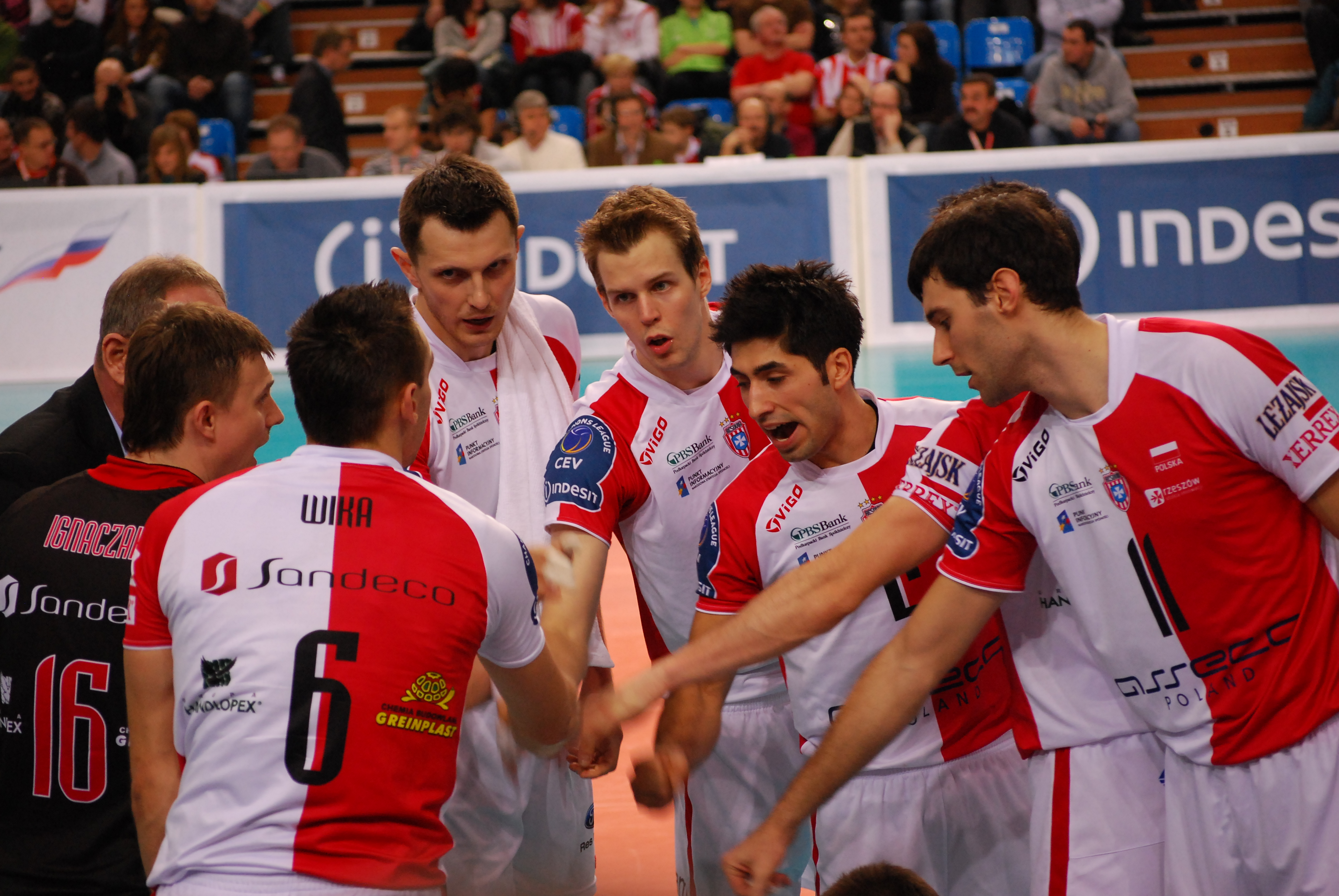 Asseco Resovia Rzeszów w meczu z Paris Volley.